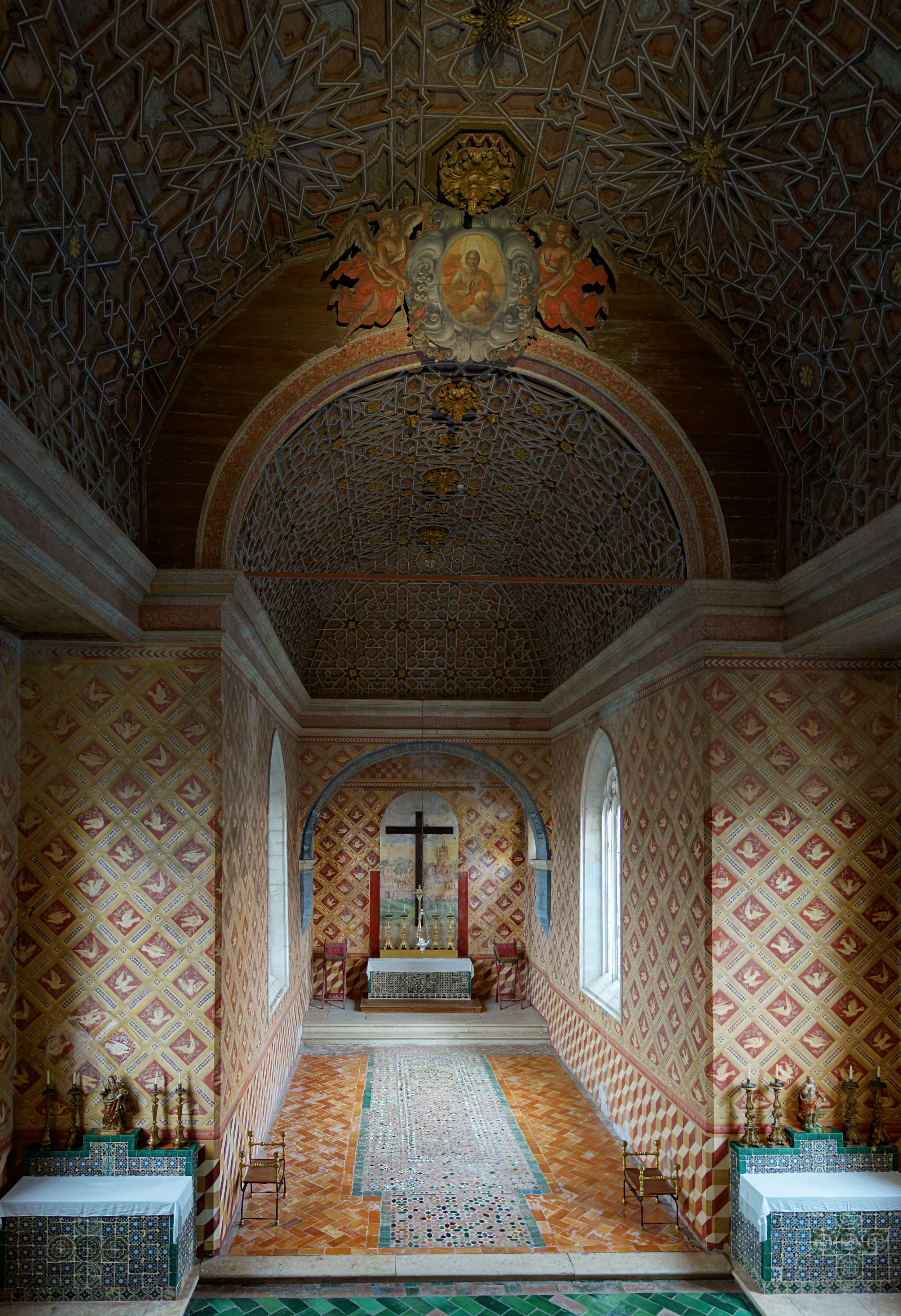 La chapelle du palais national de Sintra.